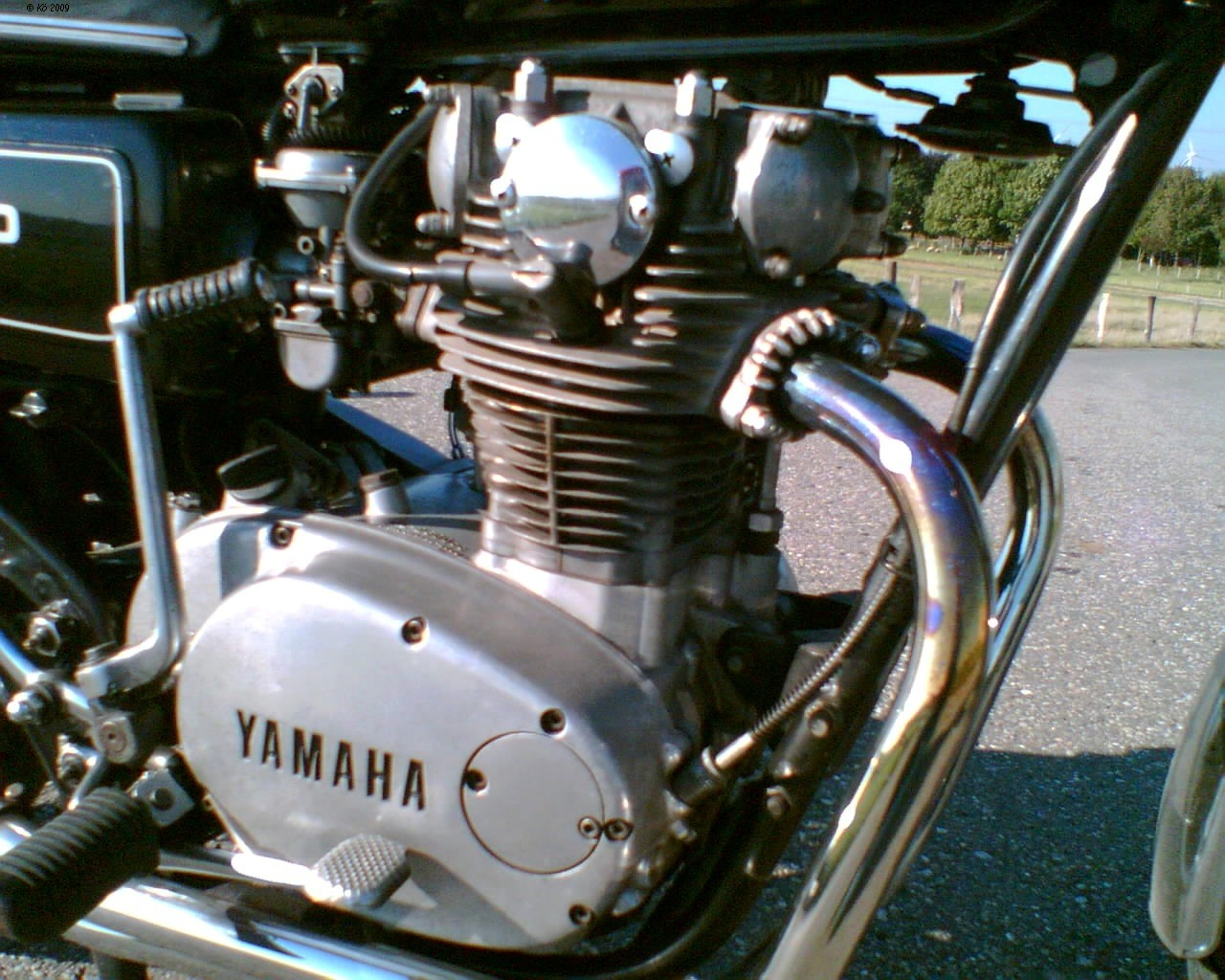 Motor einer Yamaha XS 650 (447) Baujahr 1978